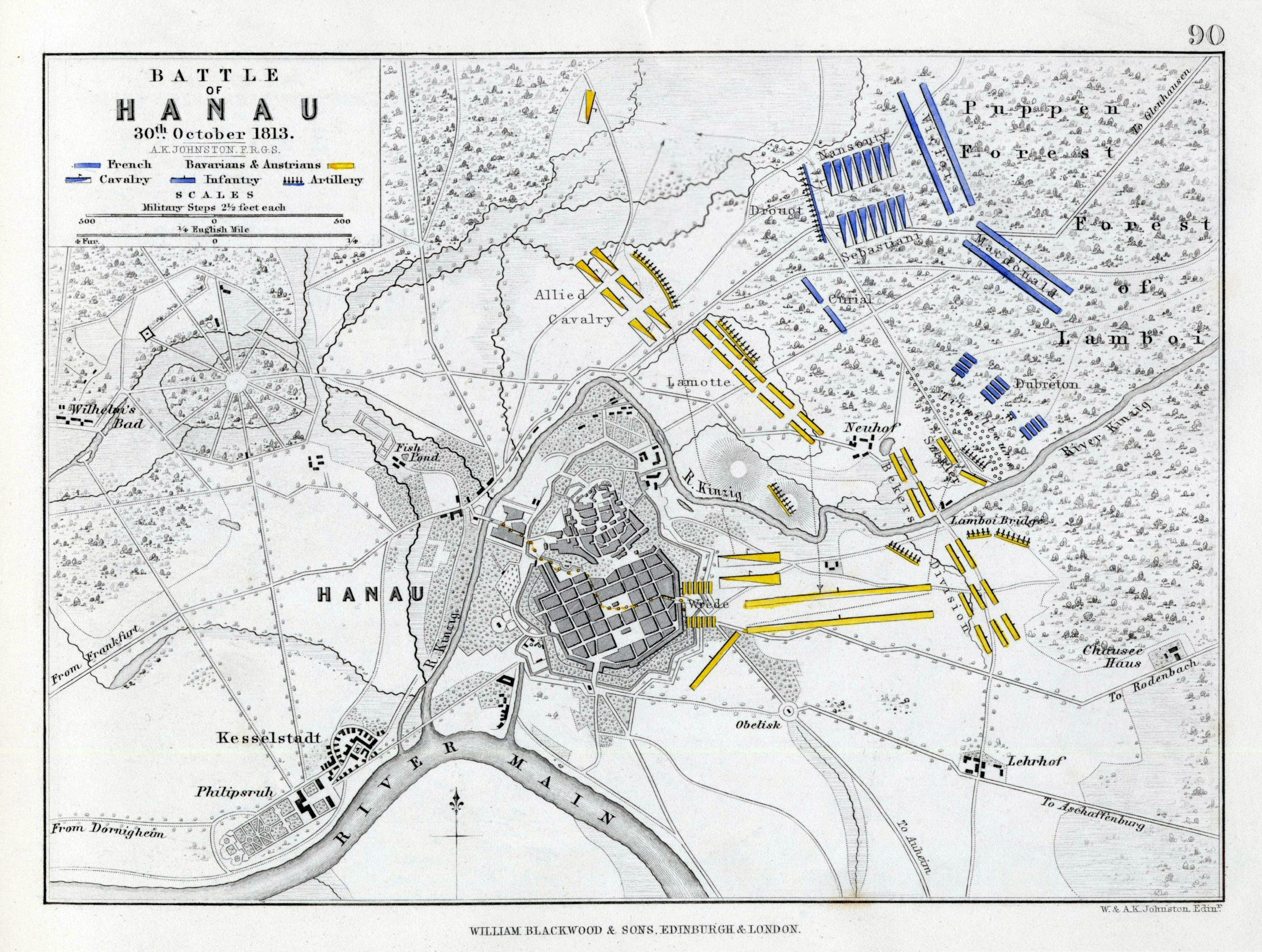 Karte der Schlacht bei Hanau. Die Karte weist die Lage der Stadt jedoch falsch aus. Die Straßen der Neustadt sind nicht wie im Bild von Südosten nach Nordwesten, sondern von Süden nach Norden orientiert.